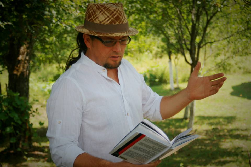 Бранислав Лукић Лука у току поетског перформанса "Дрканје цуки ноге"